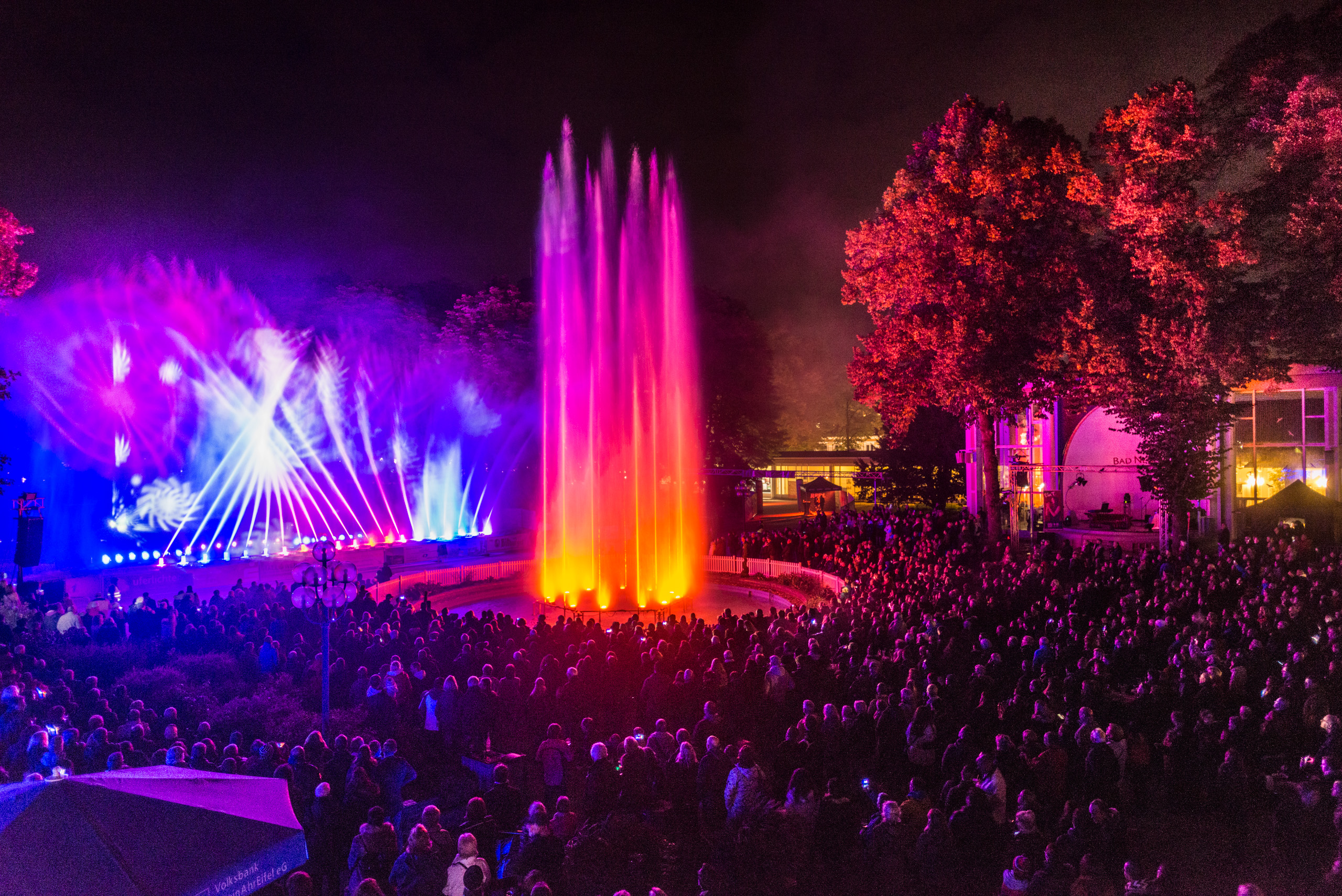 In diesem Bild der Klangwelle Bad Neuenahr-Ahrweiler werden die bis zu 30Meter hohen Wasserfontänen im Brunnen sichtbar.